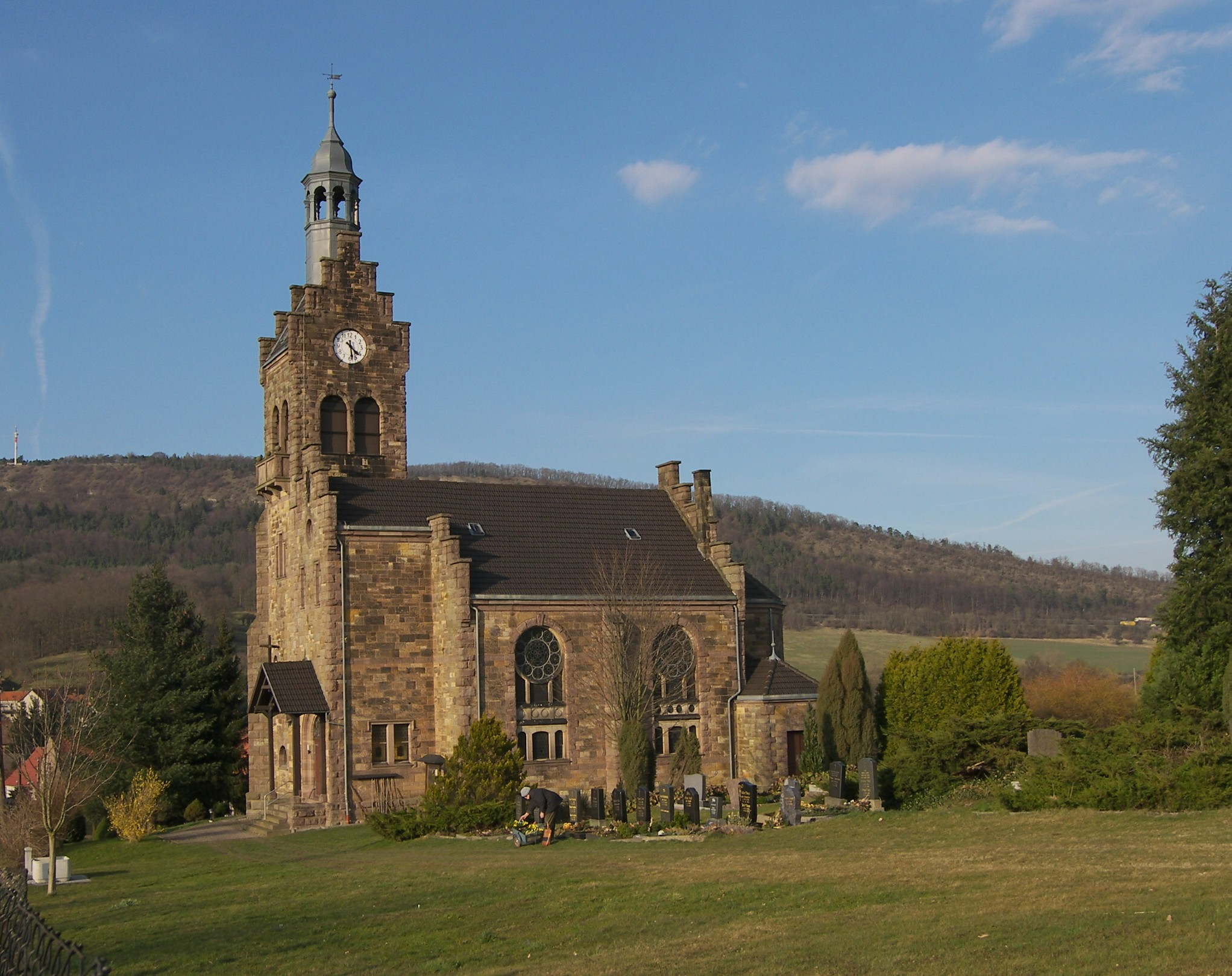 Thueringen-Hoerselberg-Kaelberfeld-Kirche